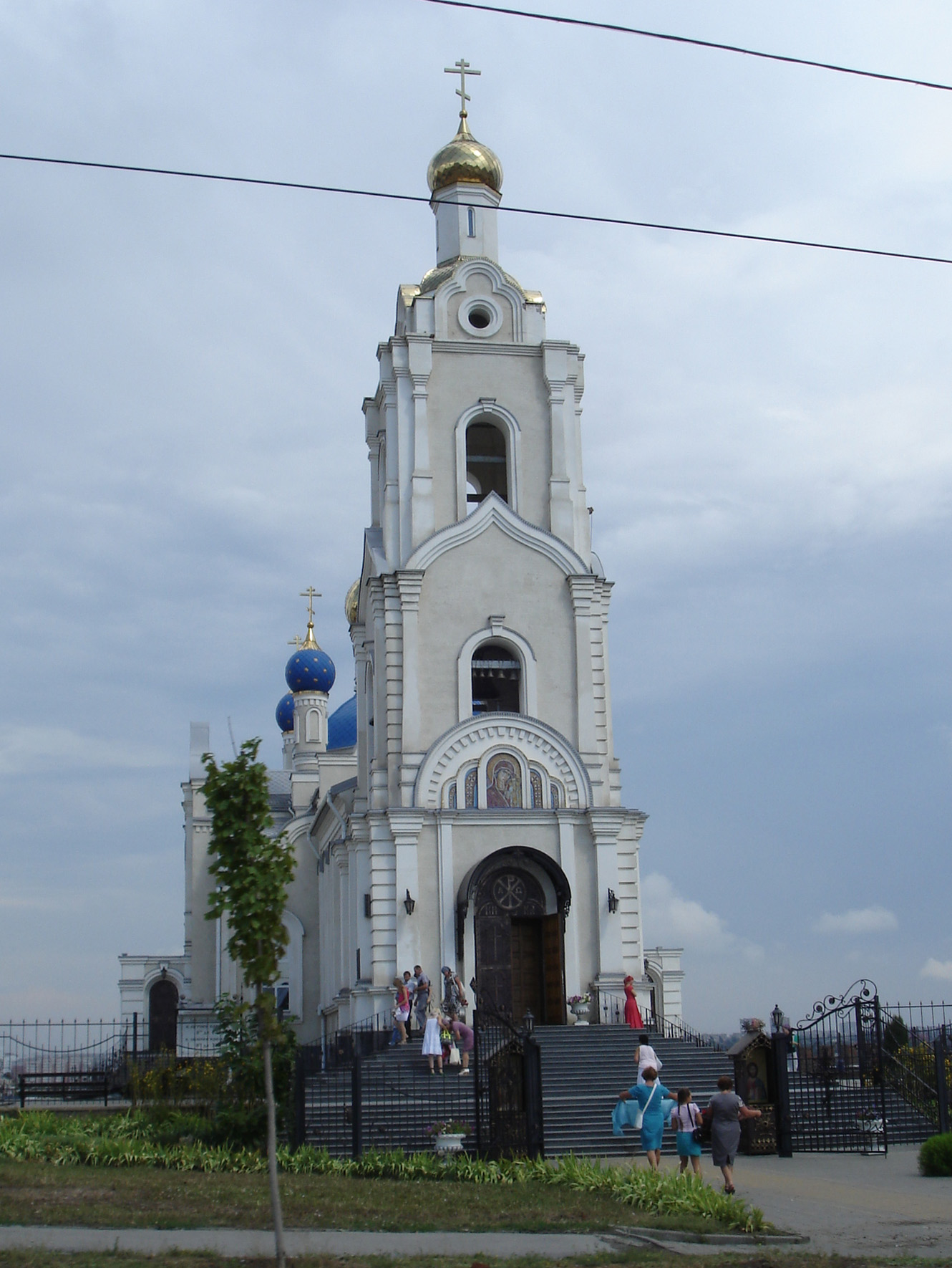 Ростов-на-Дону, церковь Казанской иконы Божией Матери